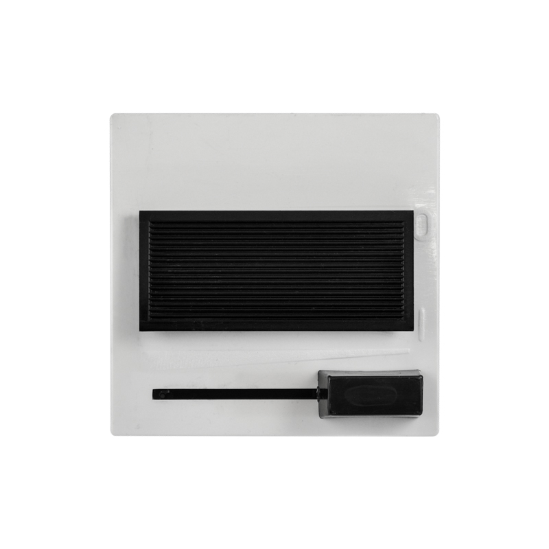 Ściemniacz RS-2, 1996 rok. Ówczesna nazwa producenta: FSE Kontakt.